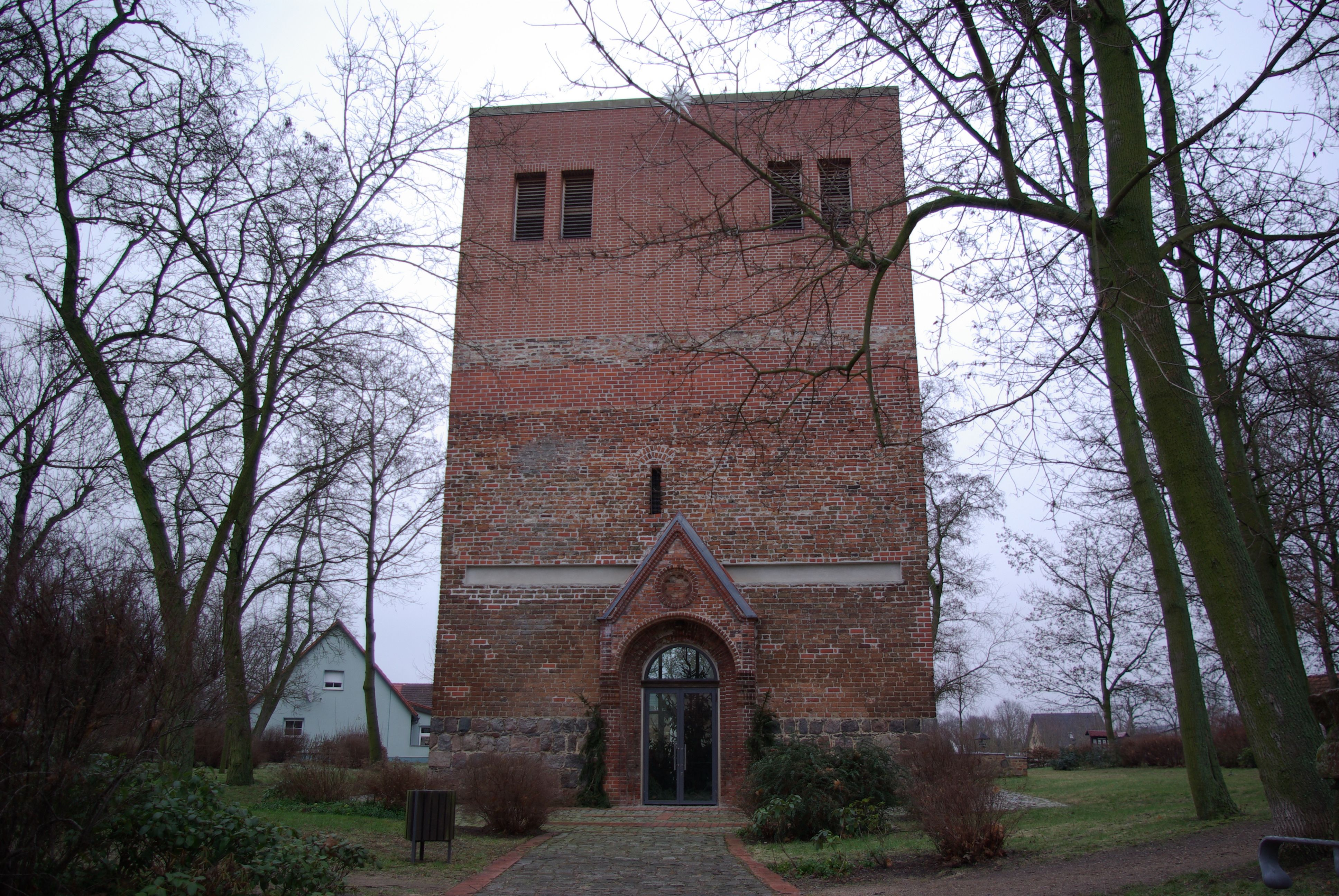 Podelzig in Brandenburg. Die Kirche steht unter Denkmalschutz. Die Kirche wurde im Spätmittelalter erbaut und im Zweiten Weltkrieg zerstört.